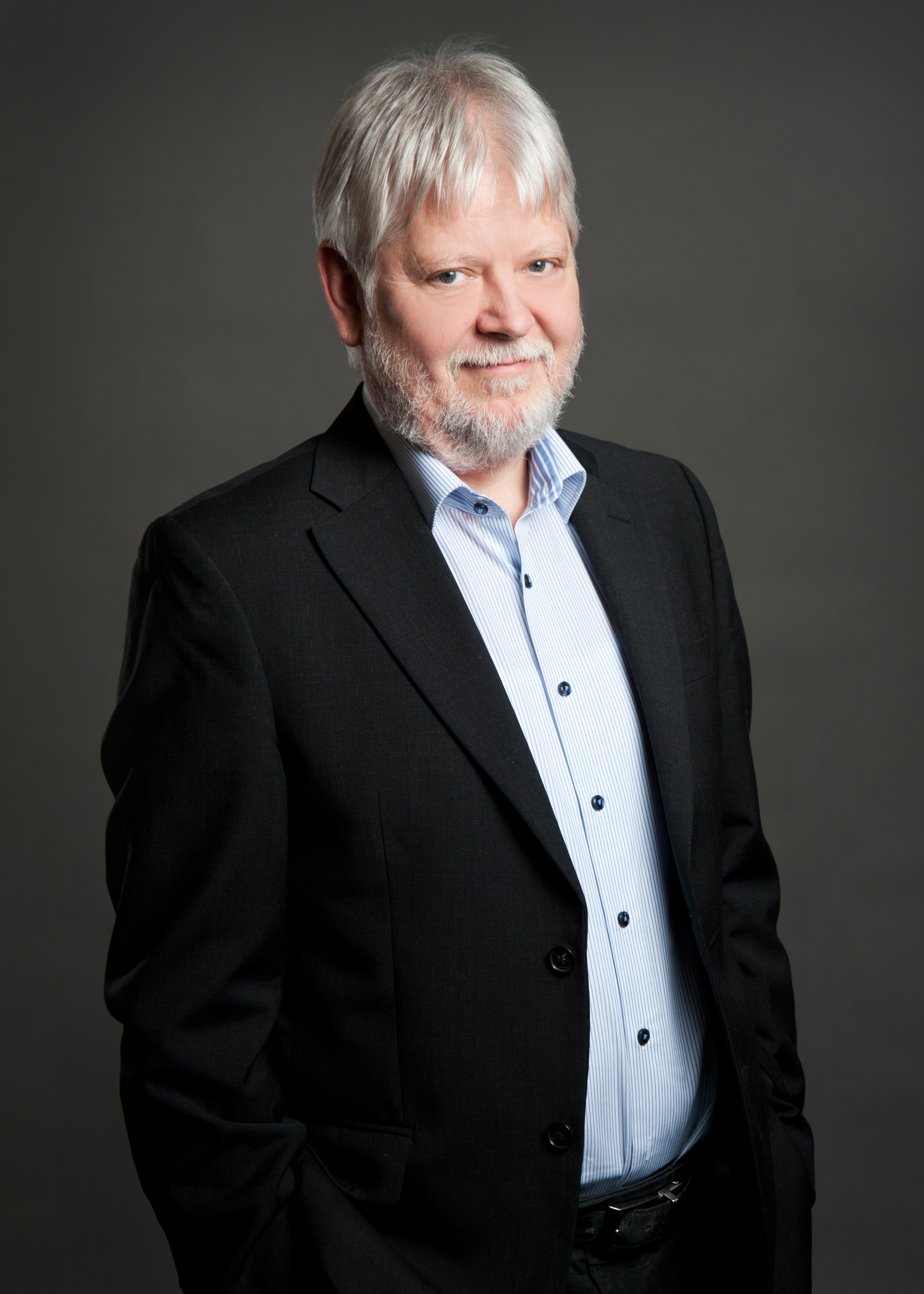 Helmut Markov, Minister in Brandenburg